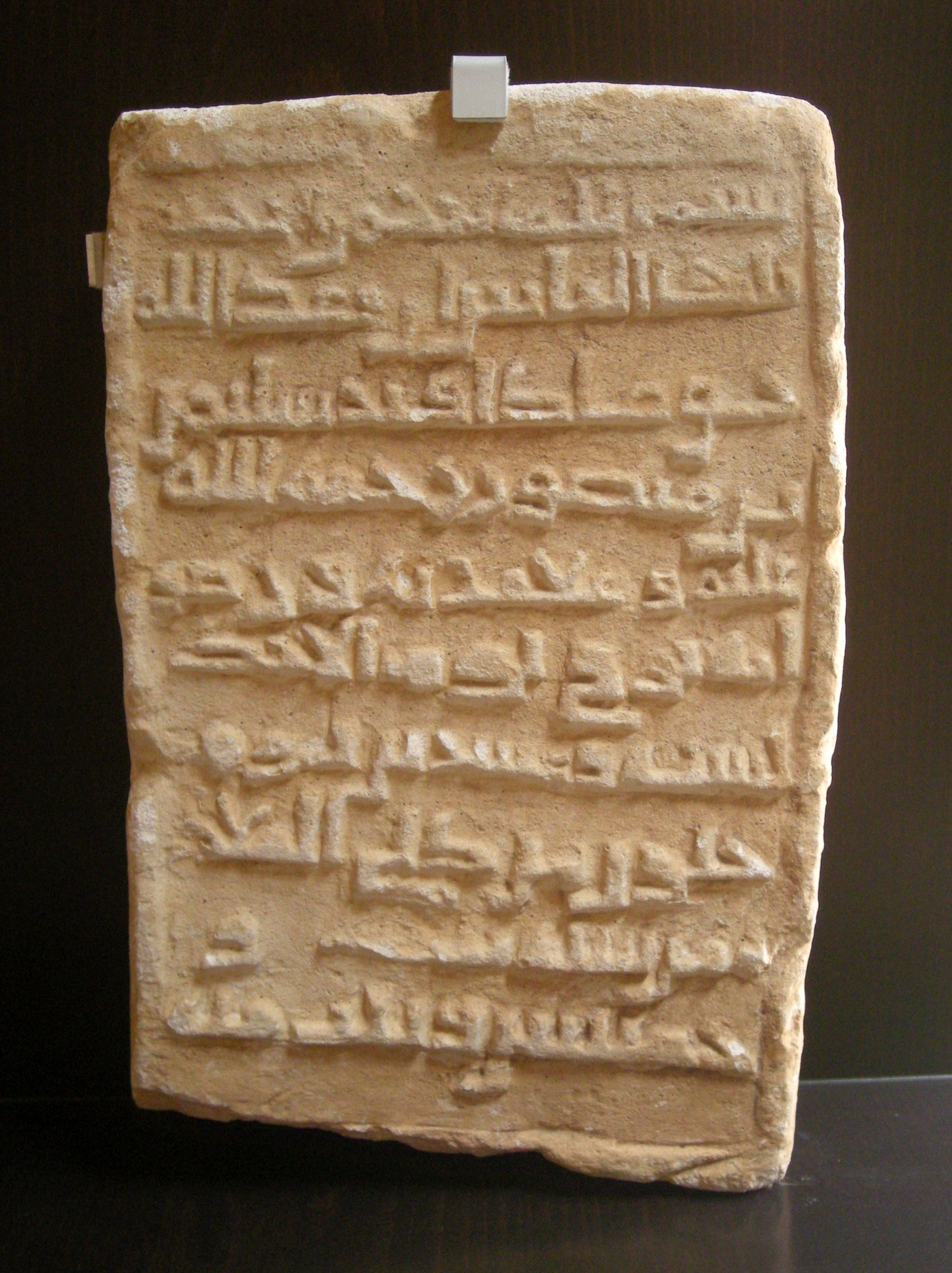 Placa àrab del Museu d'Història de Mancor. Làpida funerària de Sulayman ibn Mansur, vegeu la descripció a File:Placa àrab - descripció.jpg